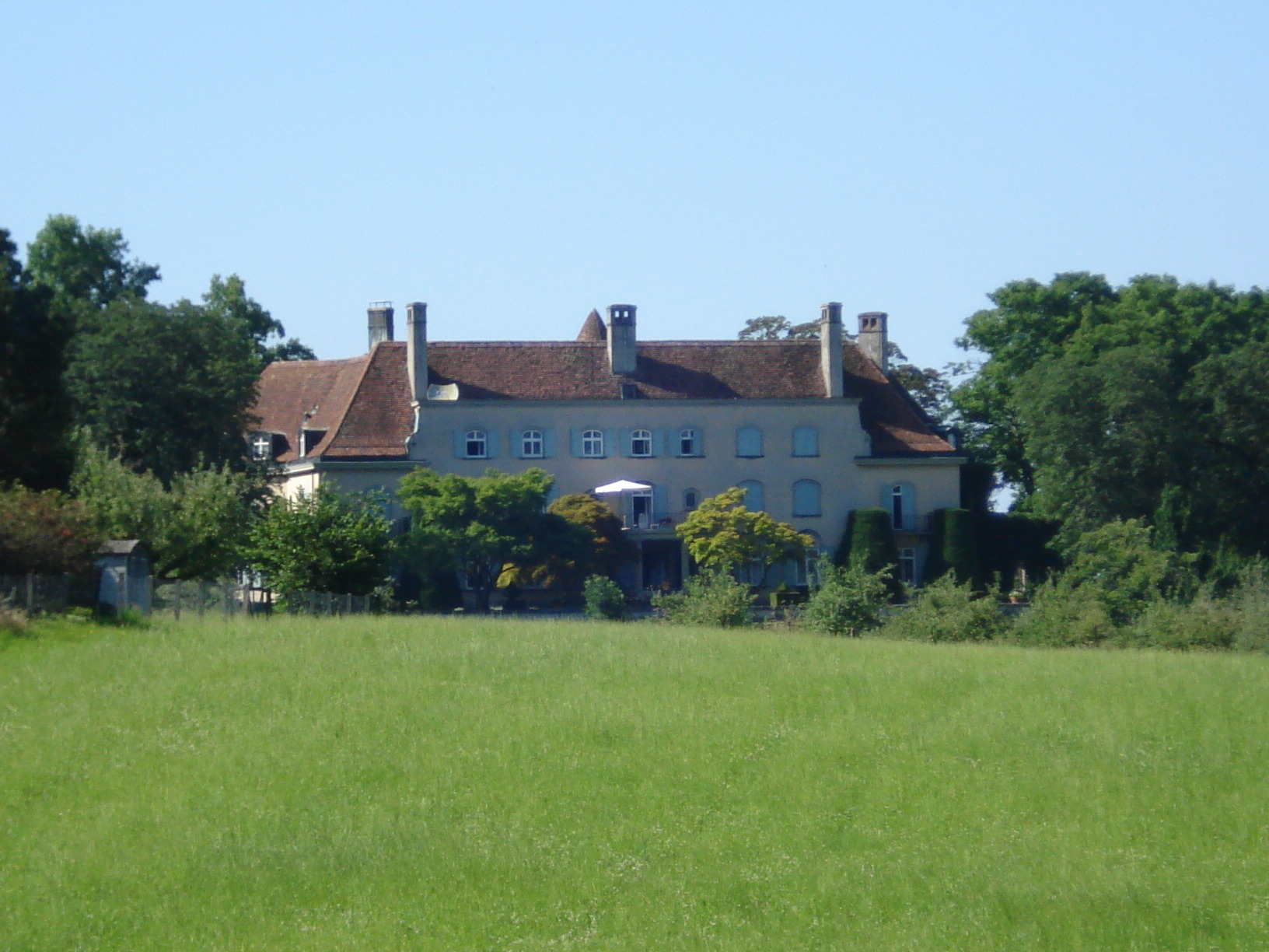 Schloss Freudenberg am Zugersee